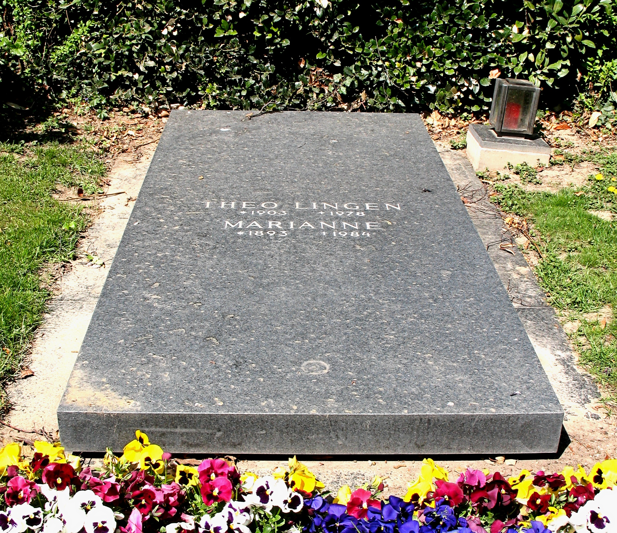 Österreich, Wien, Zentralfriedhof, Gruppe 32 C, Ehrengrab Theo Lingen (1903-1978)